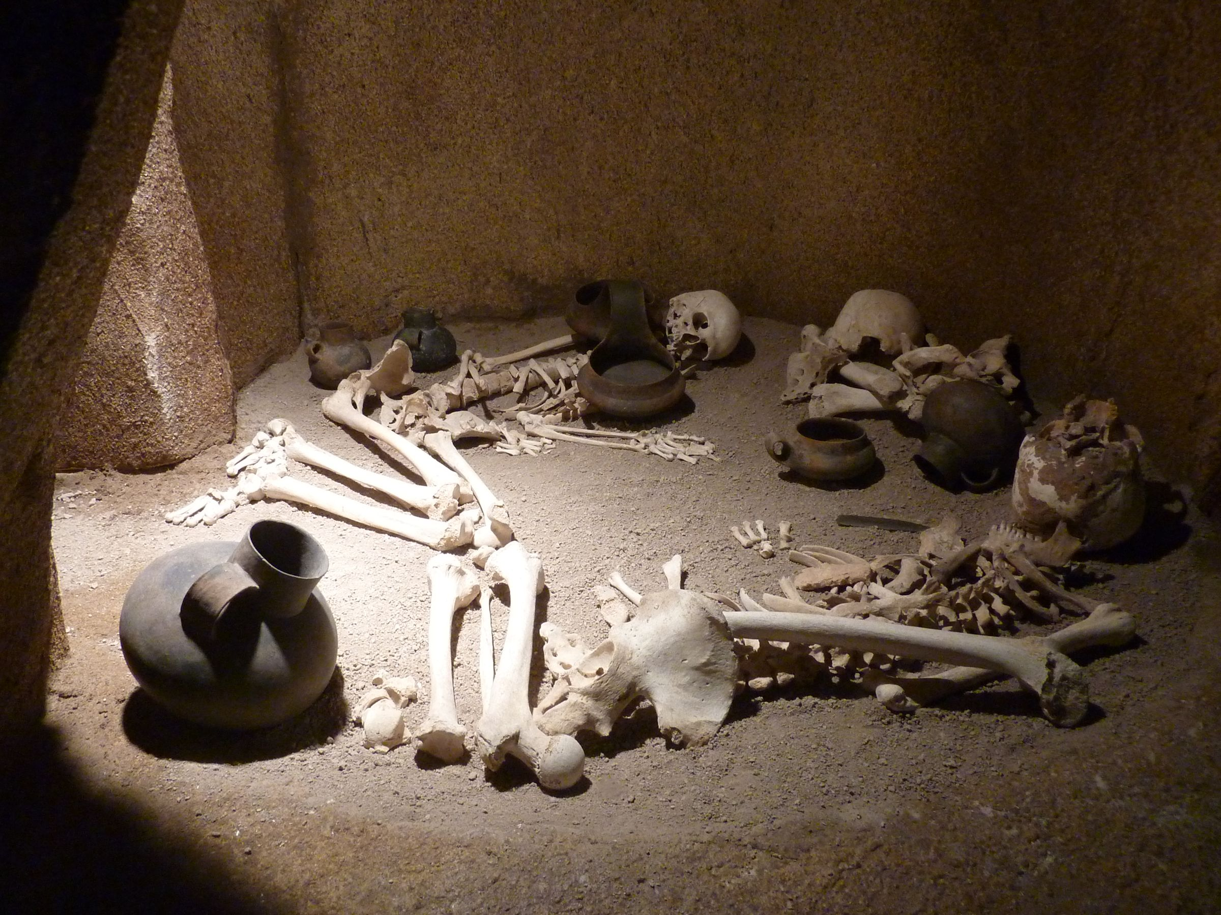 Grabfund